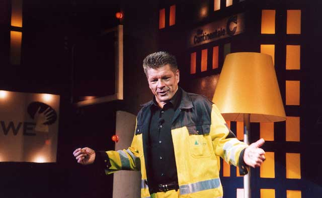 Ein Bild von Bruno "Günna" Knust in Aktion während einer seiner Vorstellungen im Theater Olpketal.